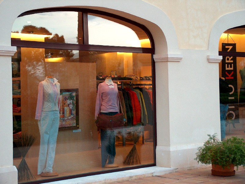 UV-Schutzfolie ist auf dem Glas so gut wie nicht zu erkennen